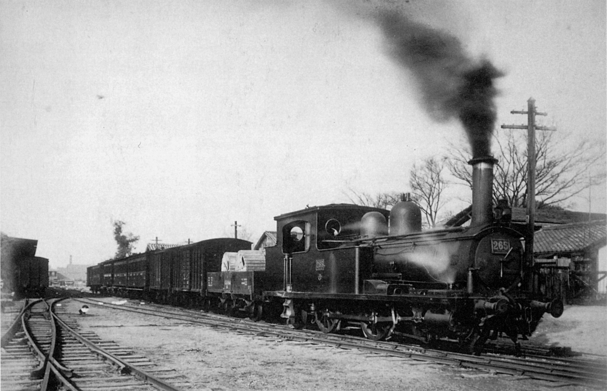 尼ヶ崎駅(後の尼崎港駅)で貨客混合列車を牽引する230形265。1915年(大正4年)11月の大正天皇の御大を記念して作成された「御大典紀念献上尼崎市写真帖」からの転載。